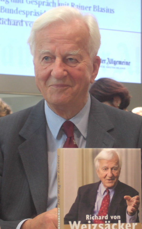 Richard von Weizsäcker bei der Präsentation seines Buches „Der Weg zur Einheit“ (2009)